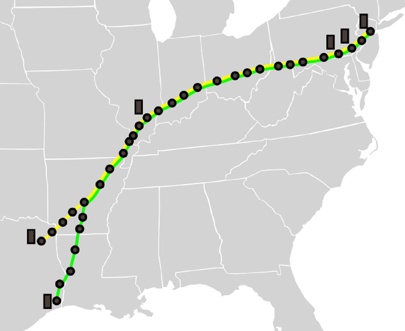 Carte du réseau pipeline Big Inch et le Little Big Inch conçu aux États-Unis durant la seconde guerre mondiale, traversant onze États, Texas, Louisiane, Arkansas, Missouri, Illinois, Indiana, Kentucky, Ohio, Pennsylvanie, New York et New Jersey .